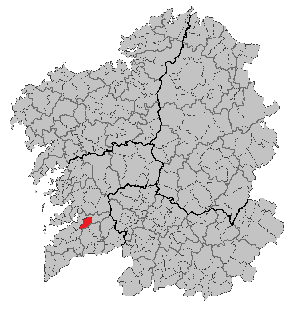 Mapa coa localización do concello de Pazos de Borbén.